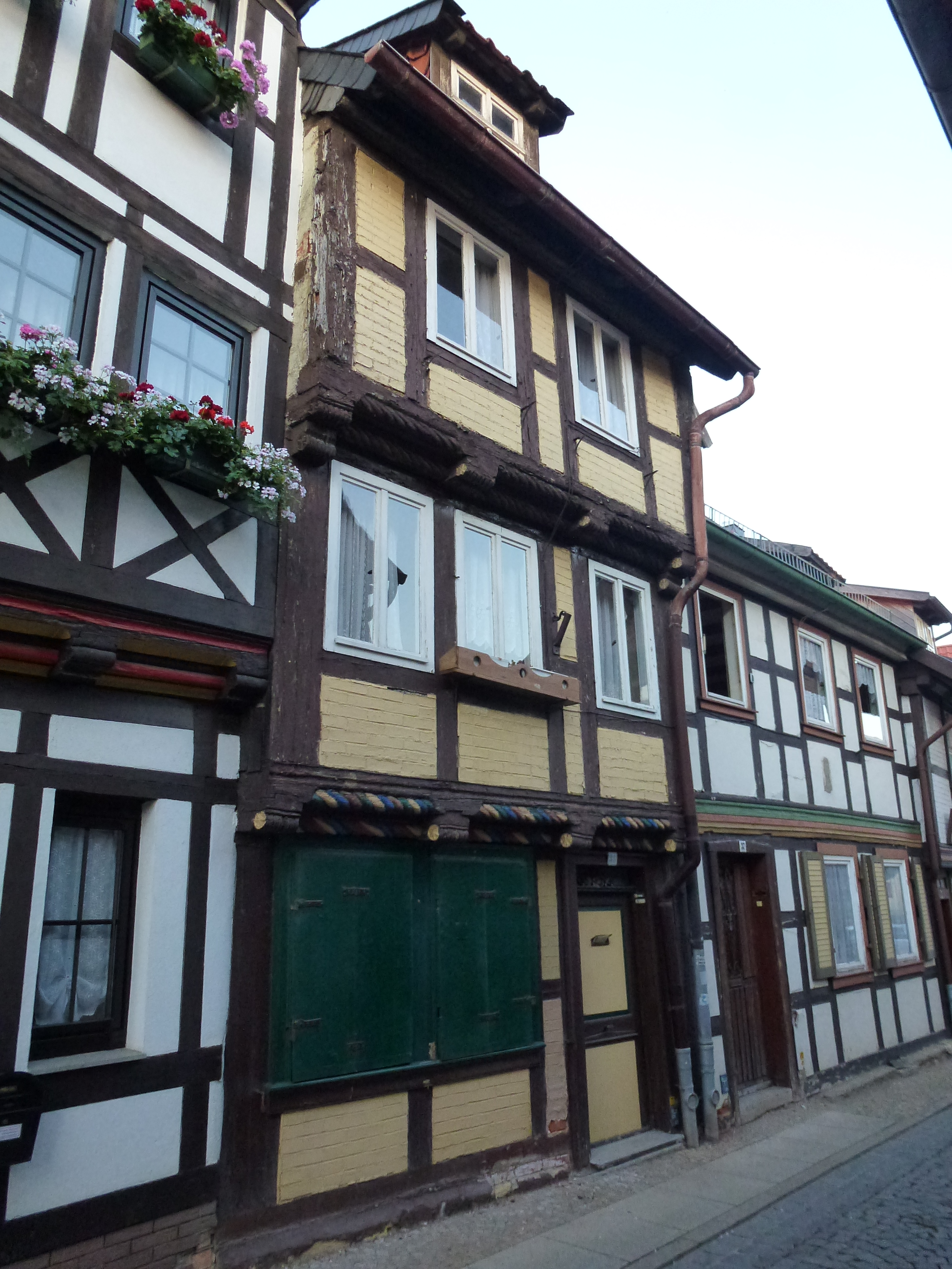 Haus Kochstraße 35 in Wernigerode